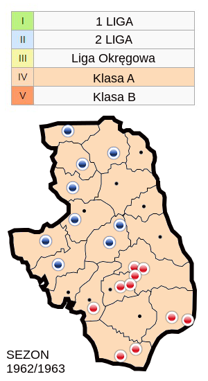 Jagiellonia w sezonie 1962/63- mapa klubów